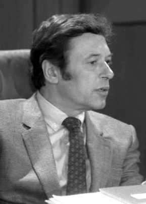 Title: Bonn, Bundeskanzler empfängt Ministerpräsidenten Extra information: Von links: Klaus Bölling und Lothar Späth People in the image: Bölling, Klaus: Regierungssprecher, Leiter des Bundespresseamtes, Leiter der Ständigen Vertretung in der DDR, Journalist, SPD, Bundesrepublik Deutschland (GND 118512692) * Späth, Lothar Dr.: Ministerpräsident von Baden-Württemberg, CDU, Bundesrepublik Deutschland Factual corrections and alternative descriptions are encouraged separately from the original description. Additionally errors can be reported at this page to inform the Bundesarchiv. Original historic description: Bundeskanzler Helmut Schmidt empfängt die Ministerpräsidenten der Länder im Bundeskanzleramt.